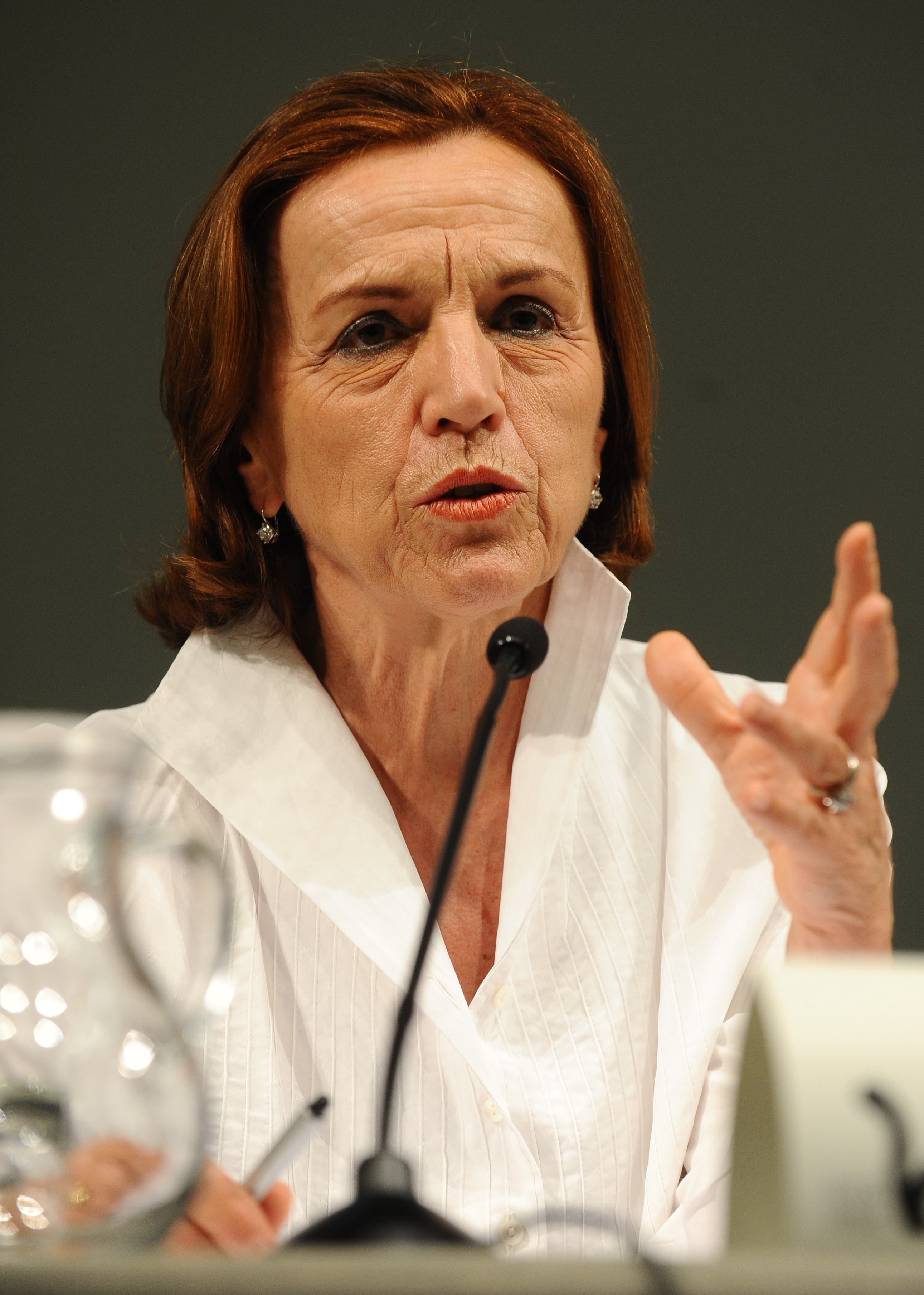 Elsa Fornero a Trento per il Festival dell'Economia 2012